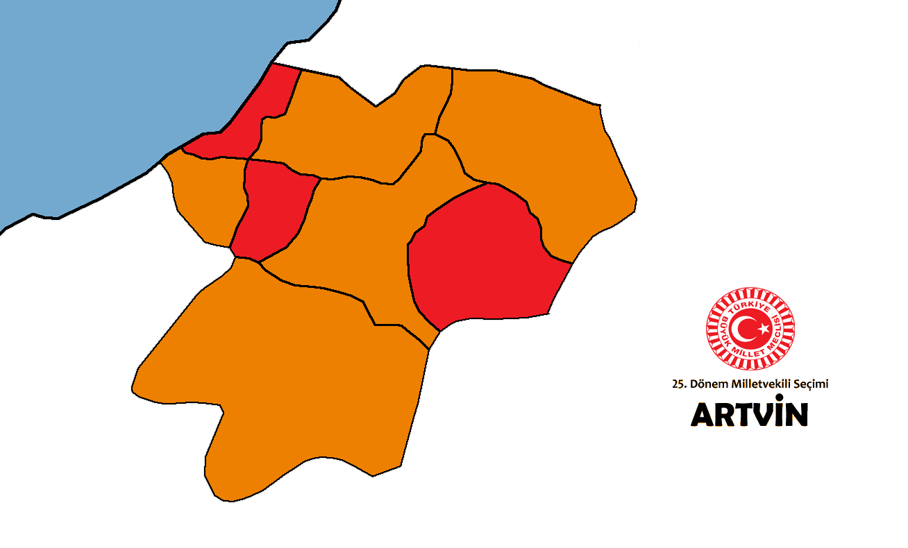 2015 genel seçim sonuçları